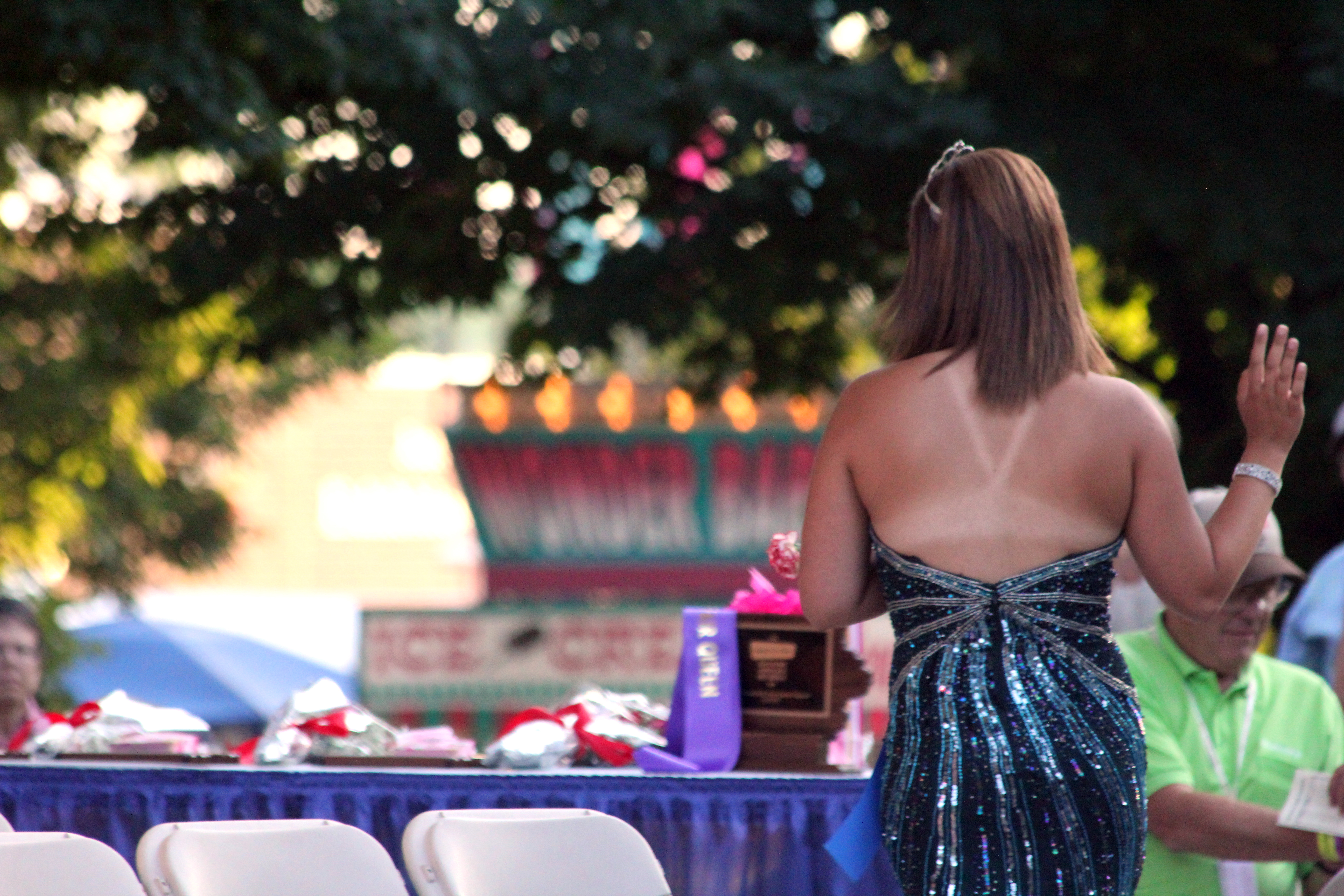 Tan lines